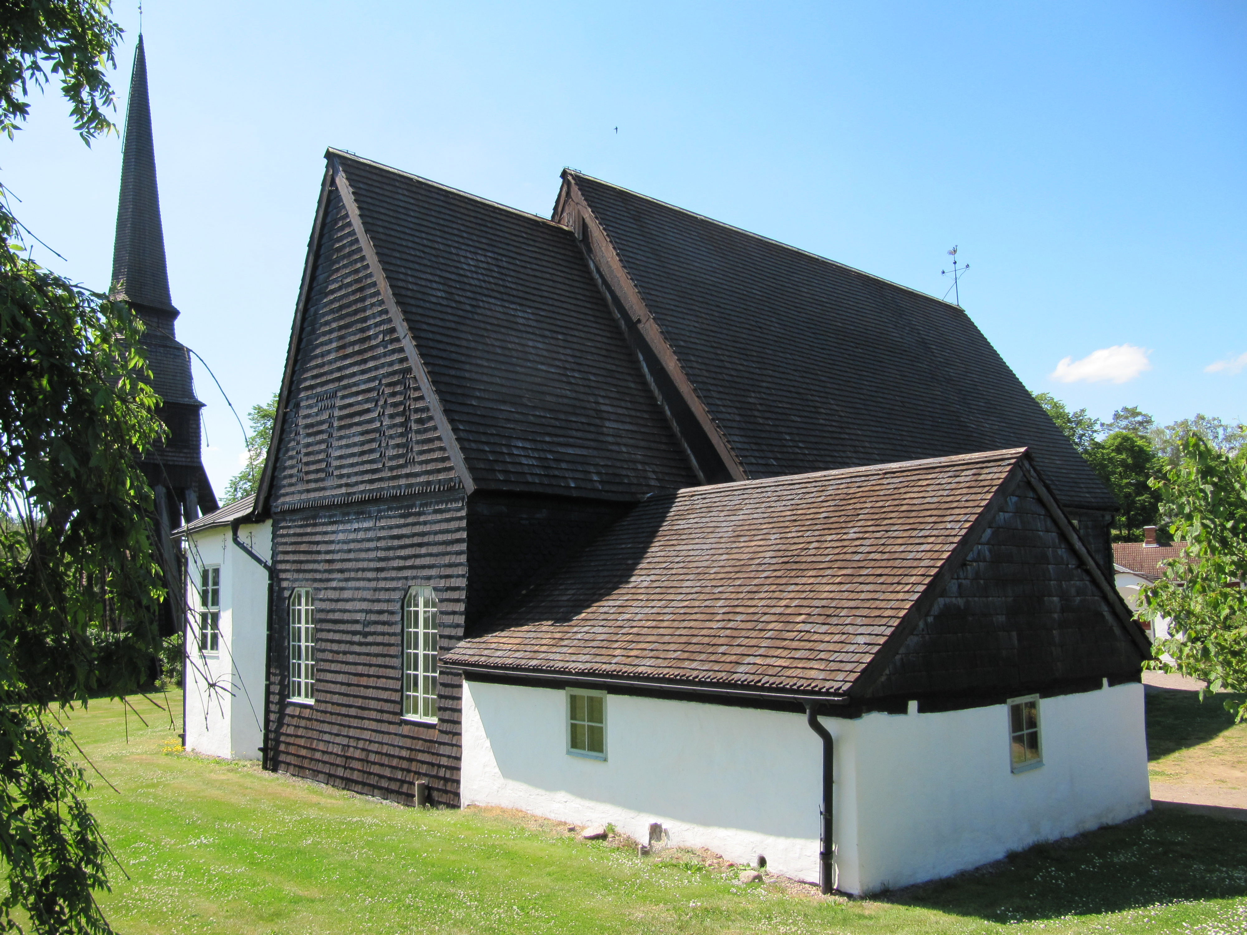 Pelarne kyrka